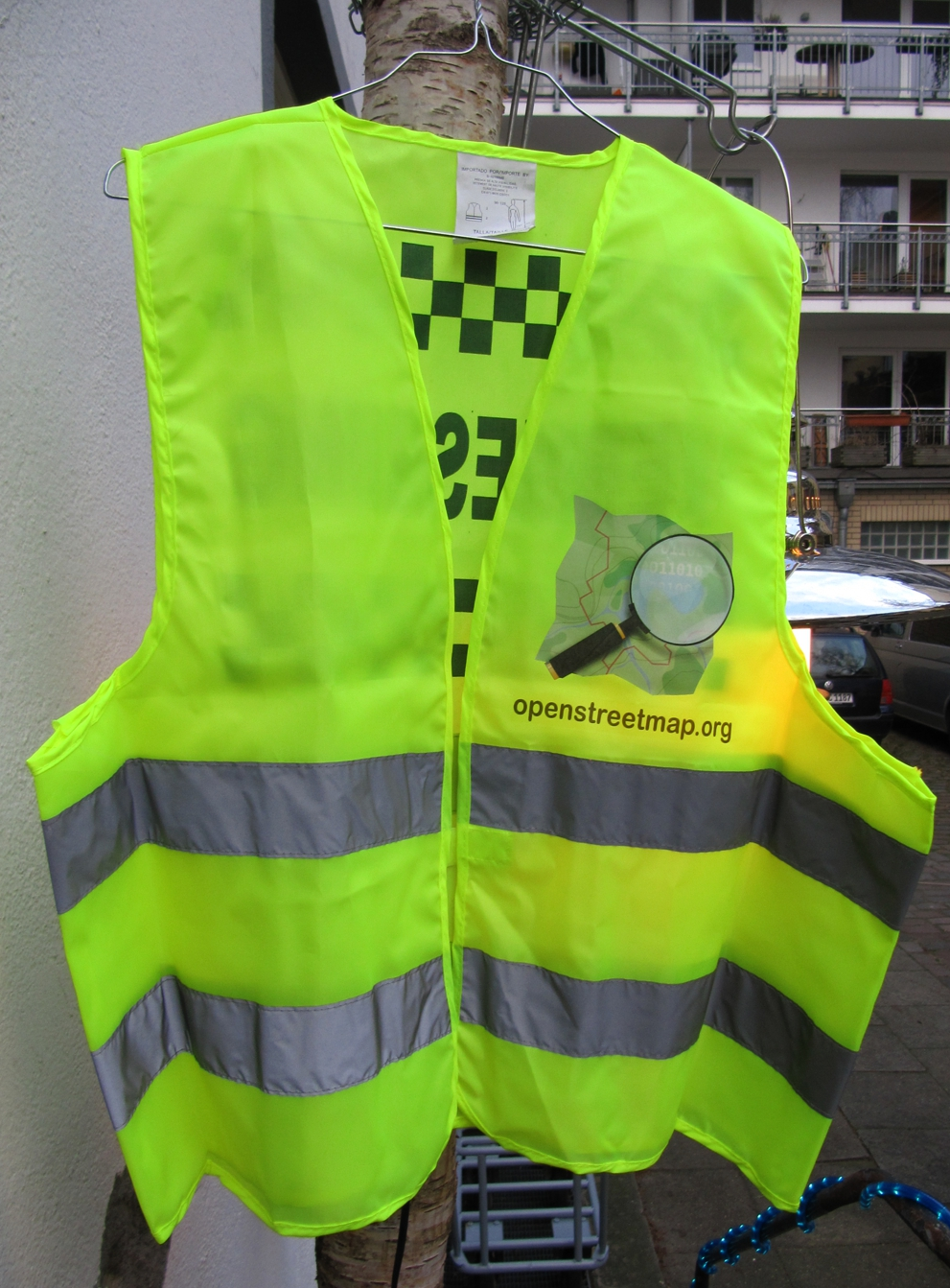 OSM-Warnweste, auf der Rückseite steht "GPS-Vermessung".